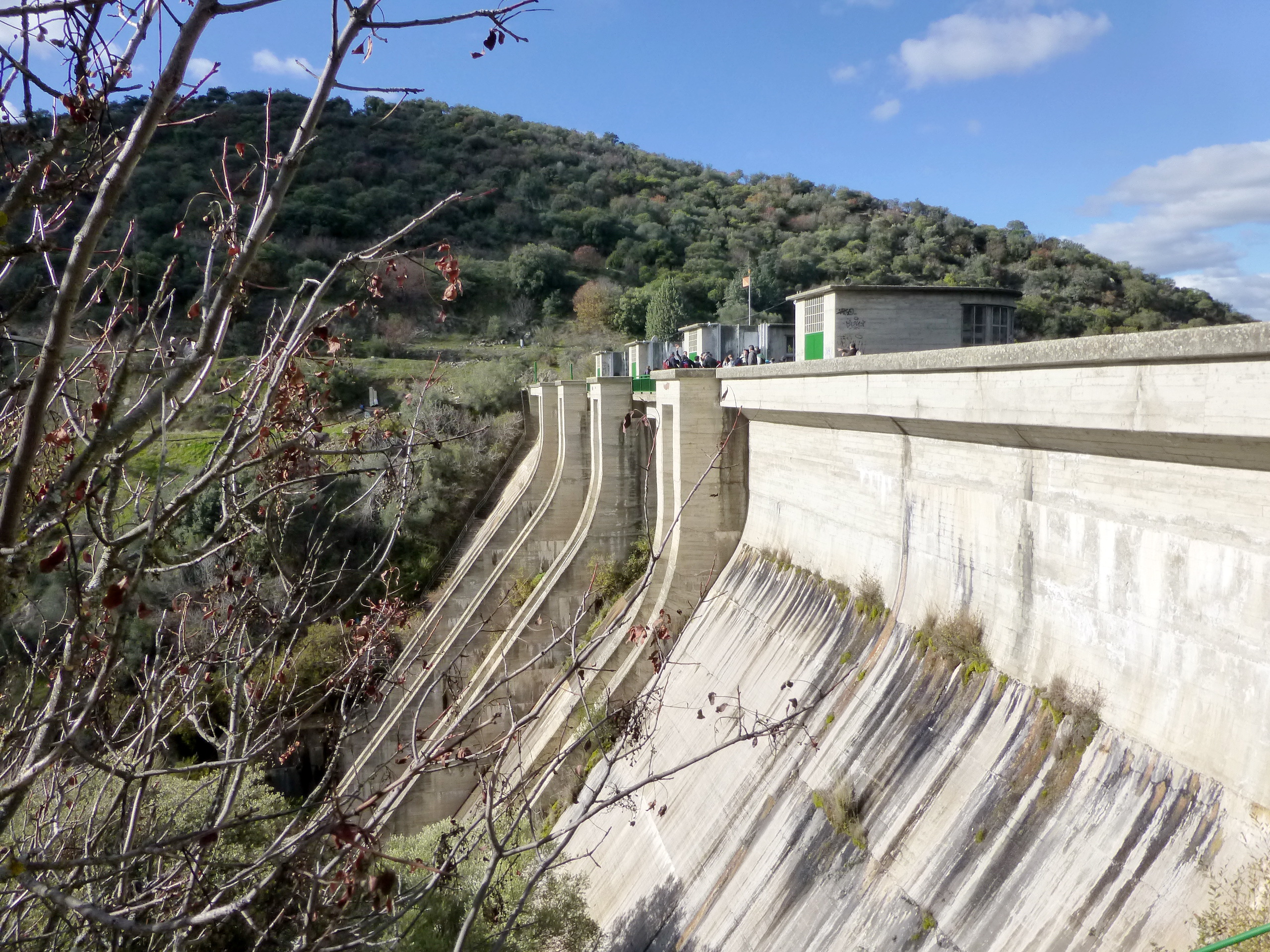 Panorámica de la presa de Picadas.